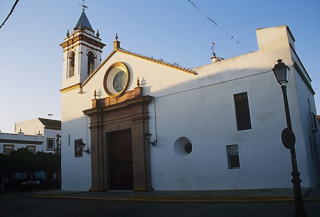 Iglesia de la Purísima Concepción de Villaverde del Río, Sevilla, España.